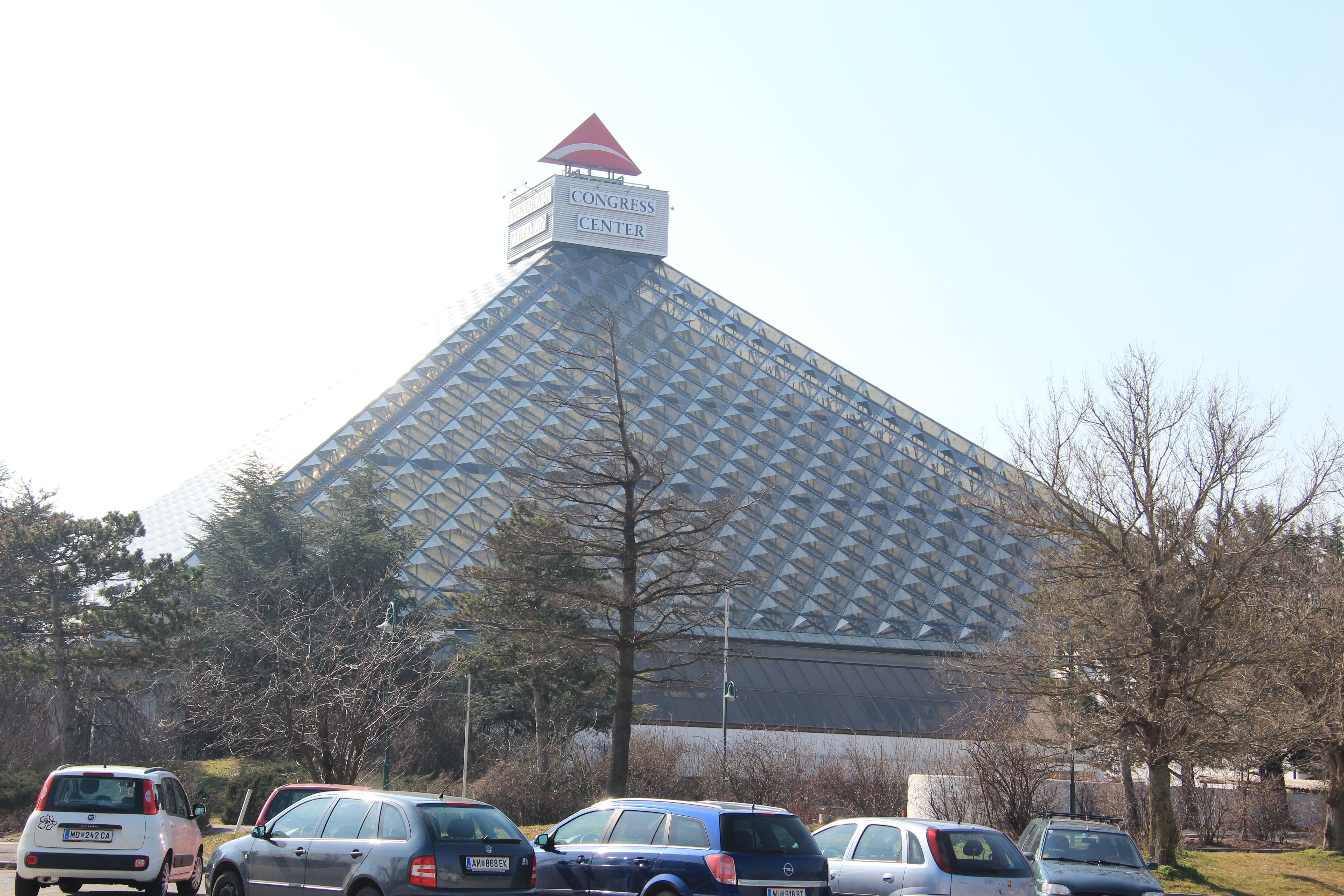 "Pyramide"-Kongresszentrum in Vösendorf, Niederösterreich